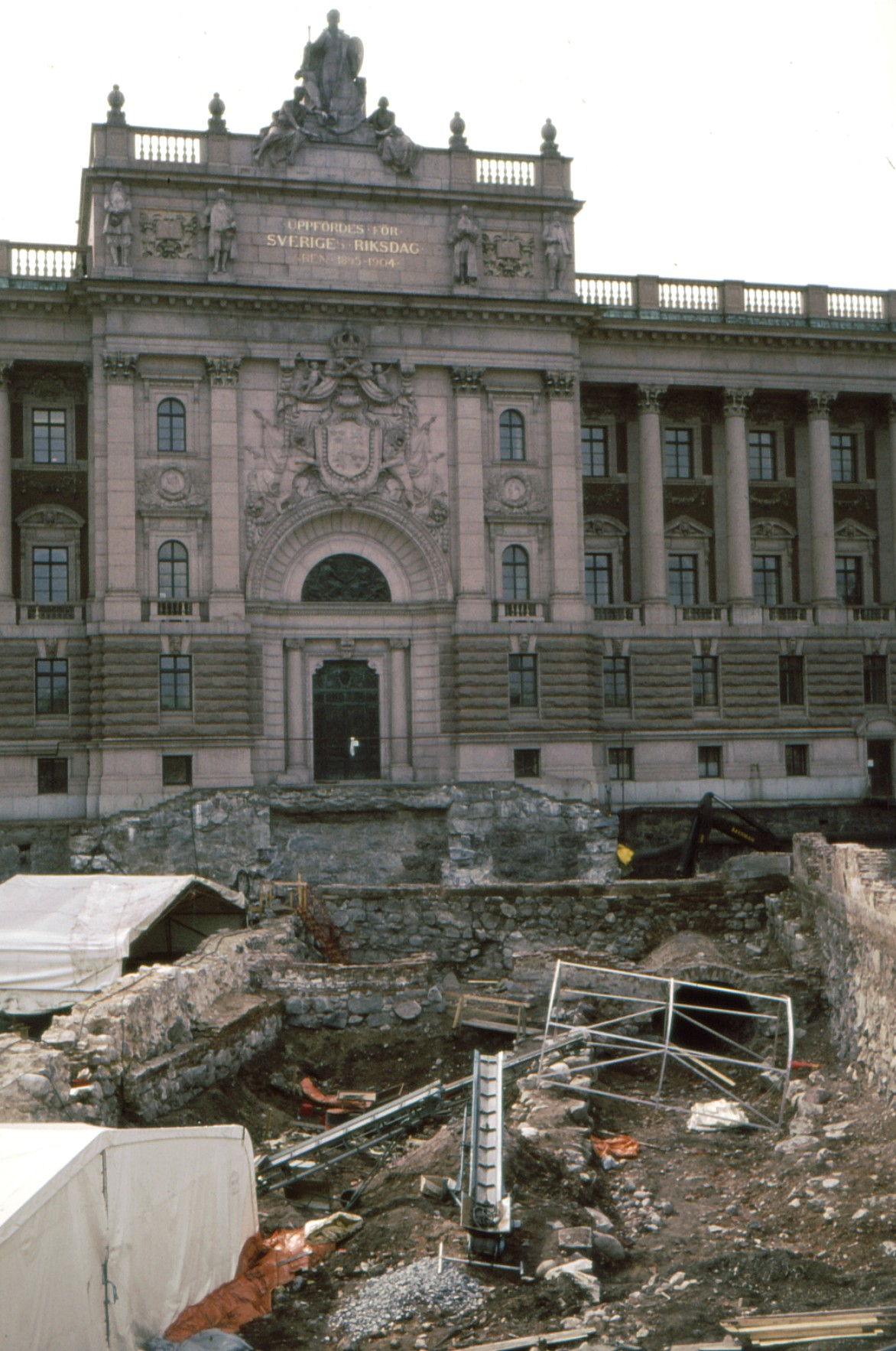 Utgrävningar framför Riksdagshuset i Stockholm, sommaren 1978